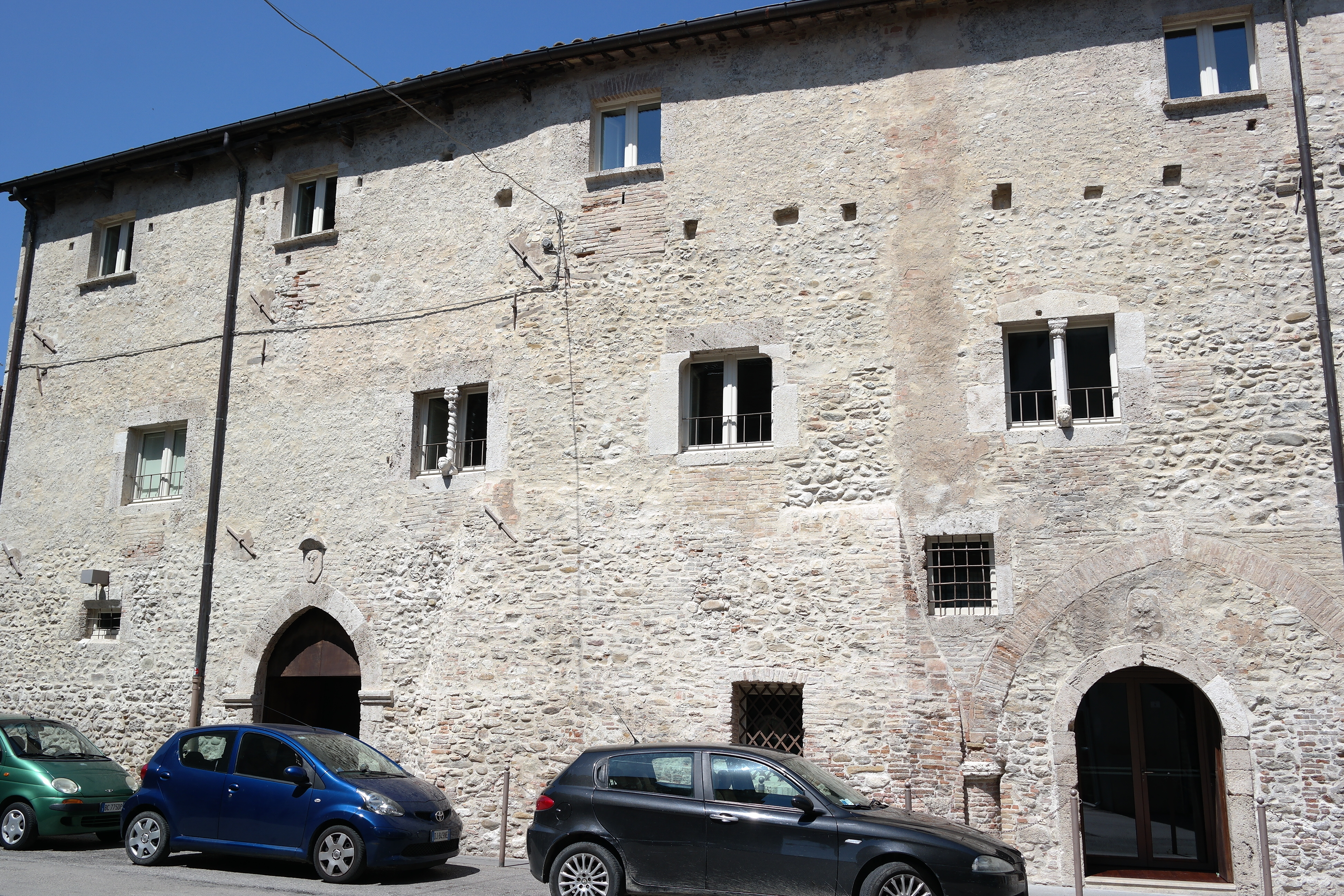 Casa dei Melatino nel centro di Teramo